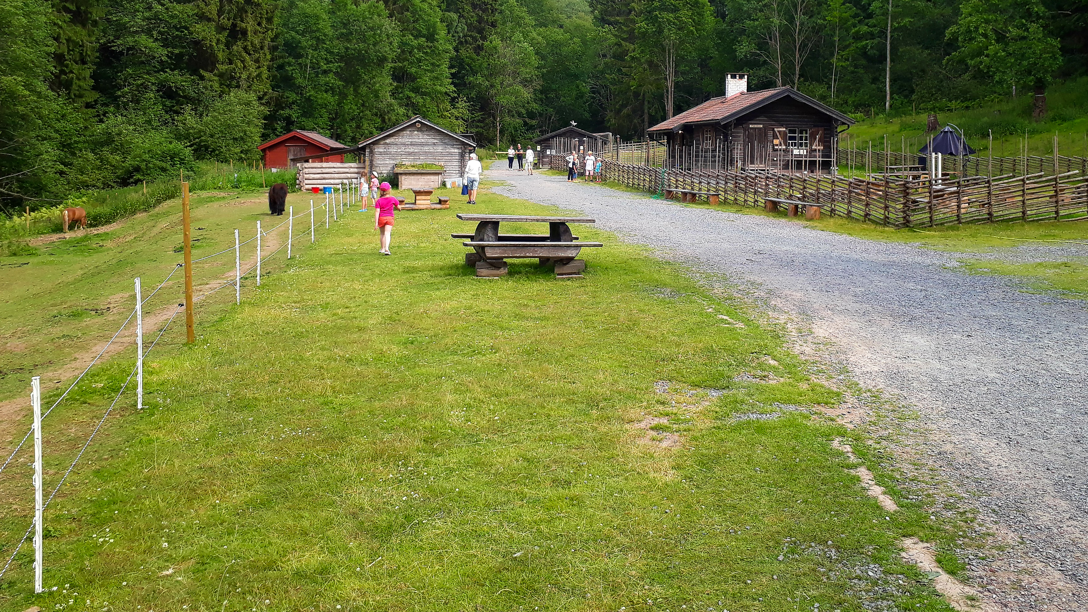 Säterdalens fäbod, Säter, Dalarnas län, Sverige